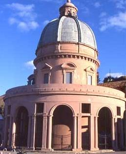 Messina Chiesa Maria Santissima delle Grazie